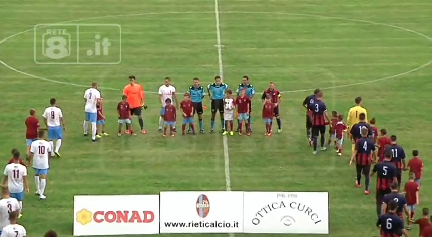 Partita di calcio Rieti-L'Aquila, terminata 1-1, terza giornata del campionato di serie D (girone G), disputata il 18 settembre 2016 allo stadio Centro d'Italia-Manlio Scopigno di Rieti